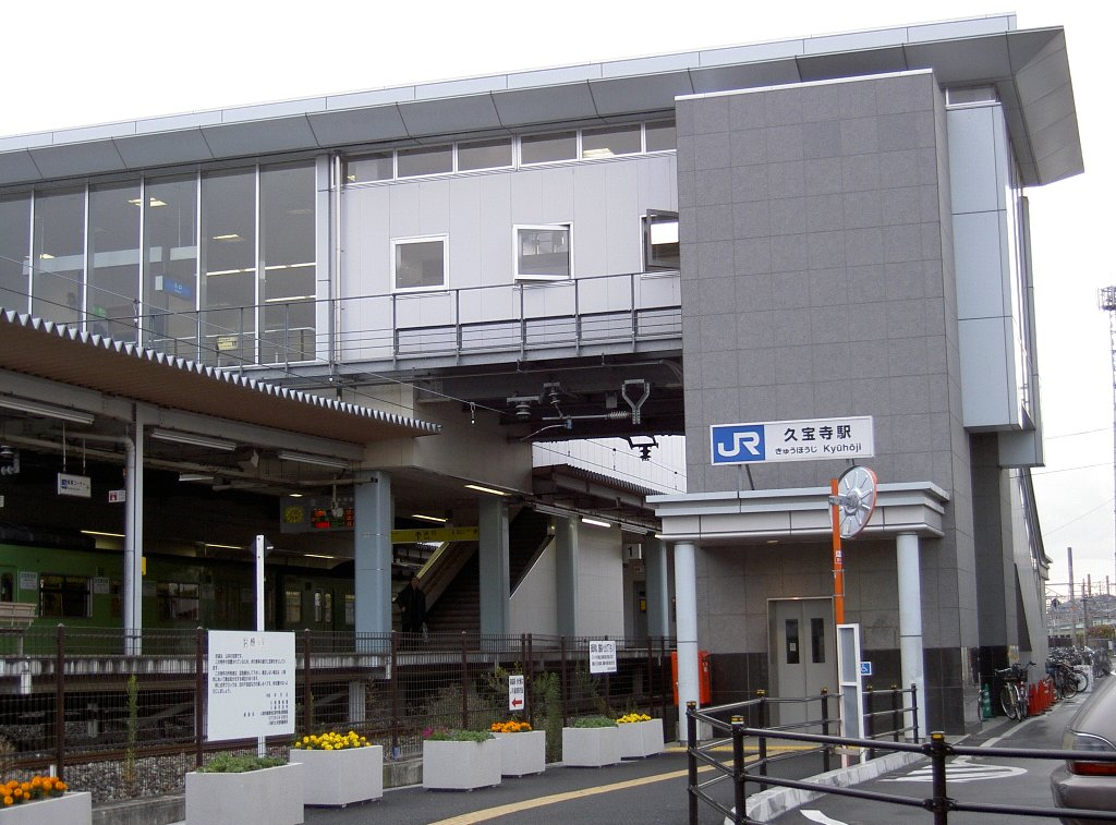 久宝寺駅 (2005/12/8)